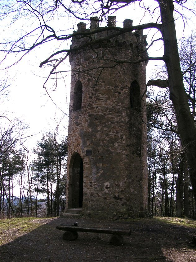 Warturm Sonstiges: ...